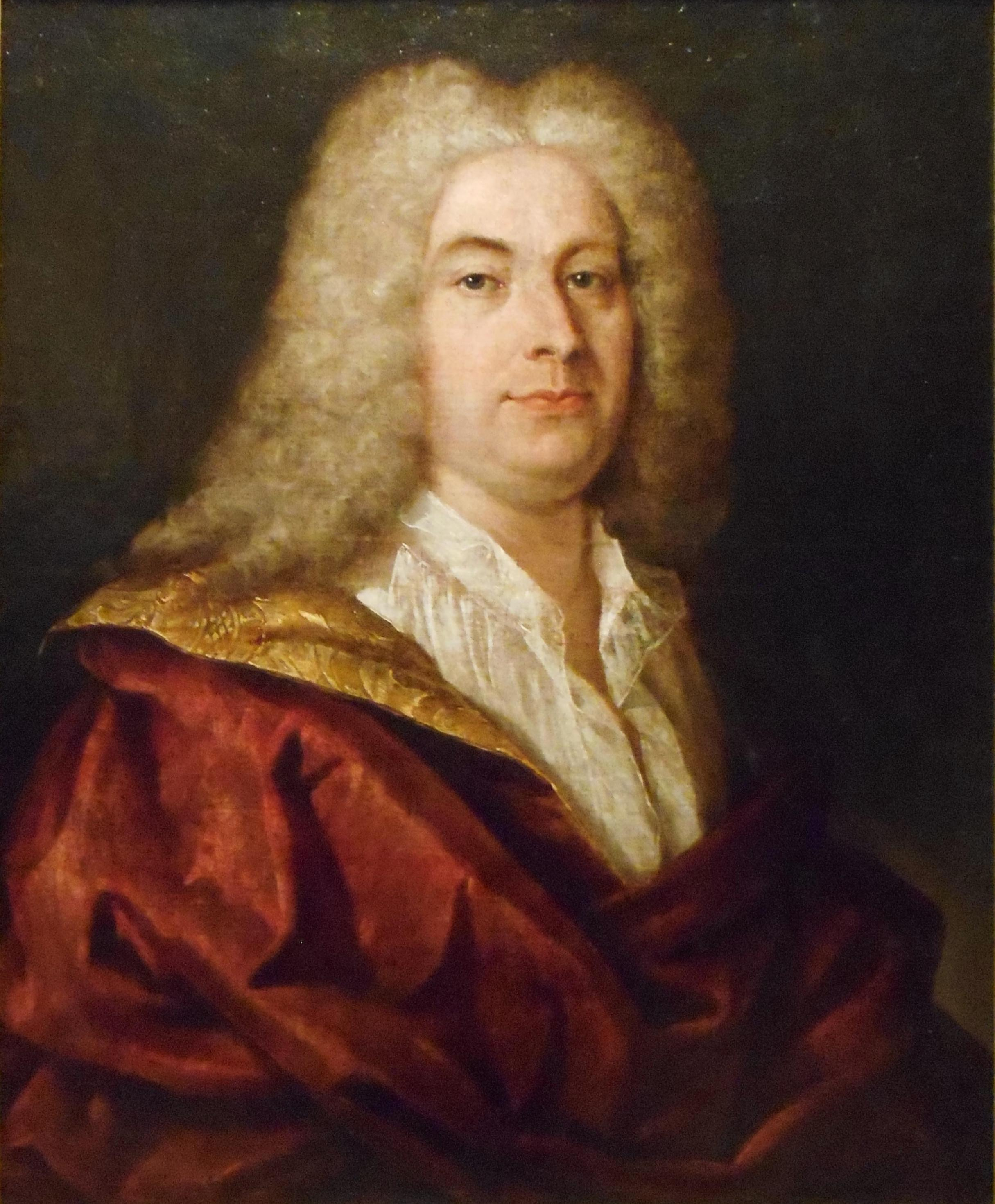 Gilles Hocquart (1694-1783)